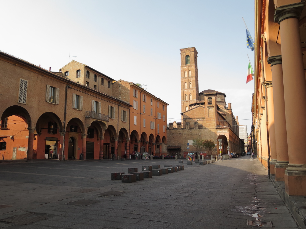 Bologna, Piazza Verdi. Settembre 2017. This is a photo of a monument which is part of cultural heritage of Italy.